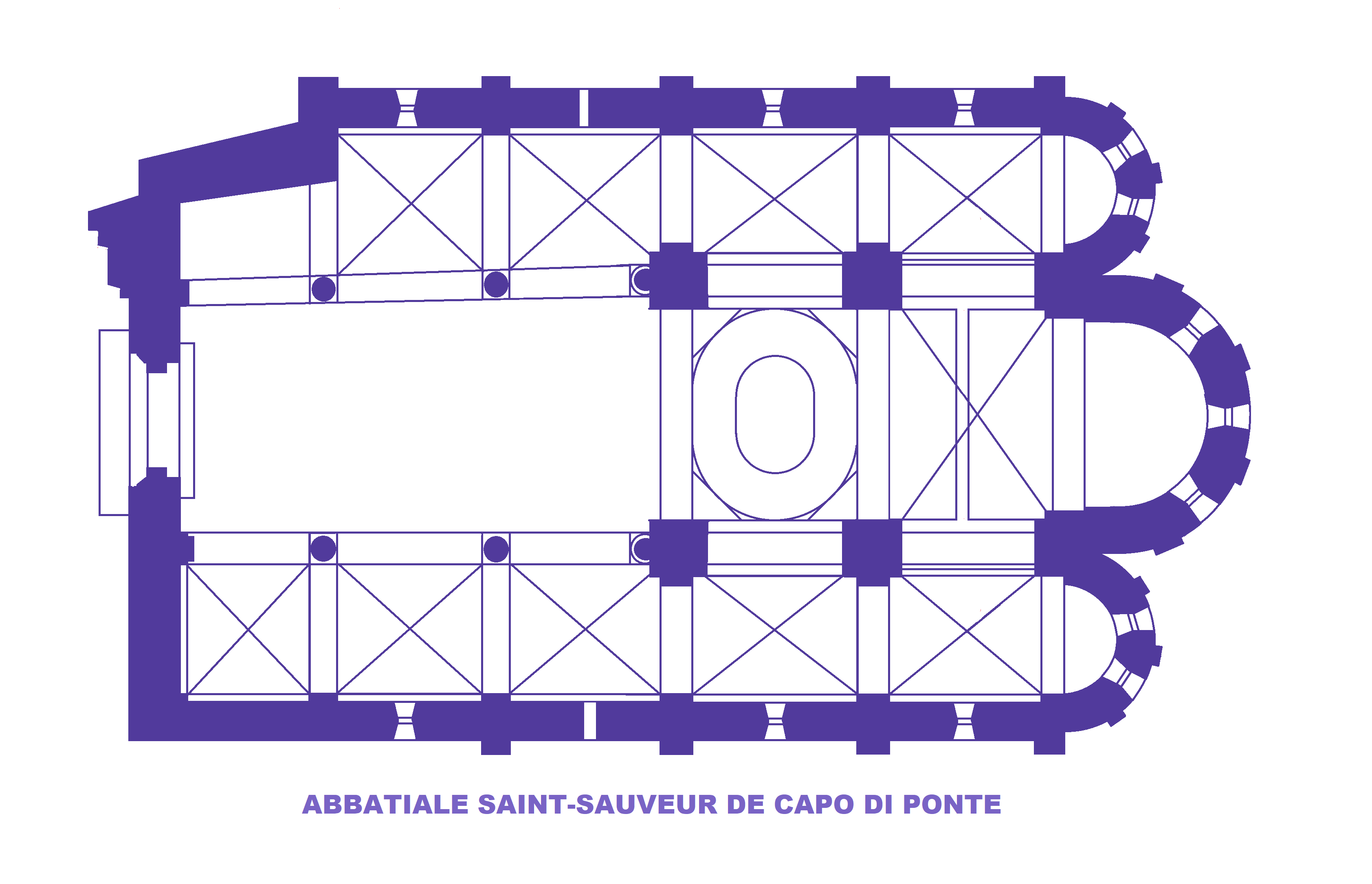 Abbatiale Saint-Sauveur de Capo di Ponte